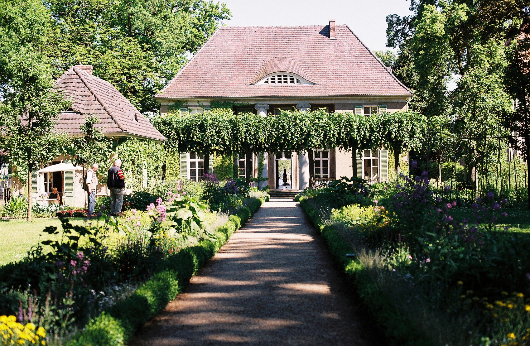 Liebermann-Villa